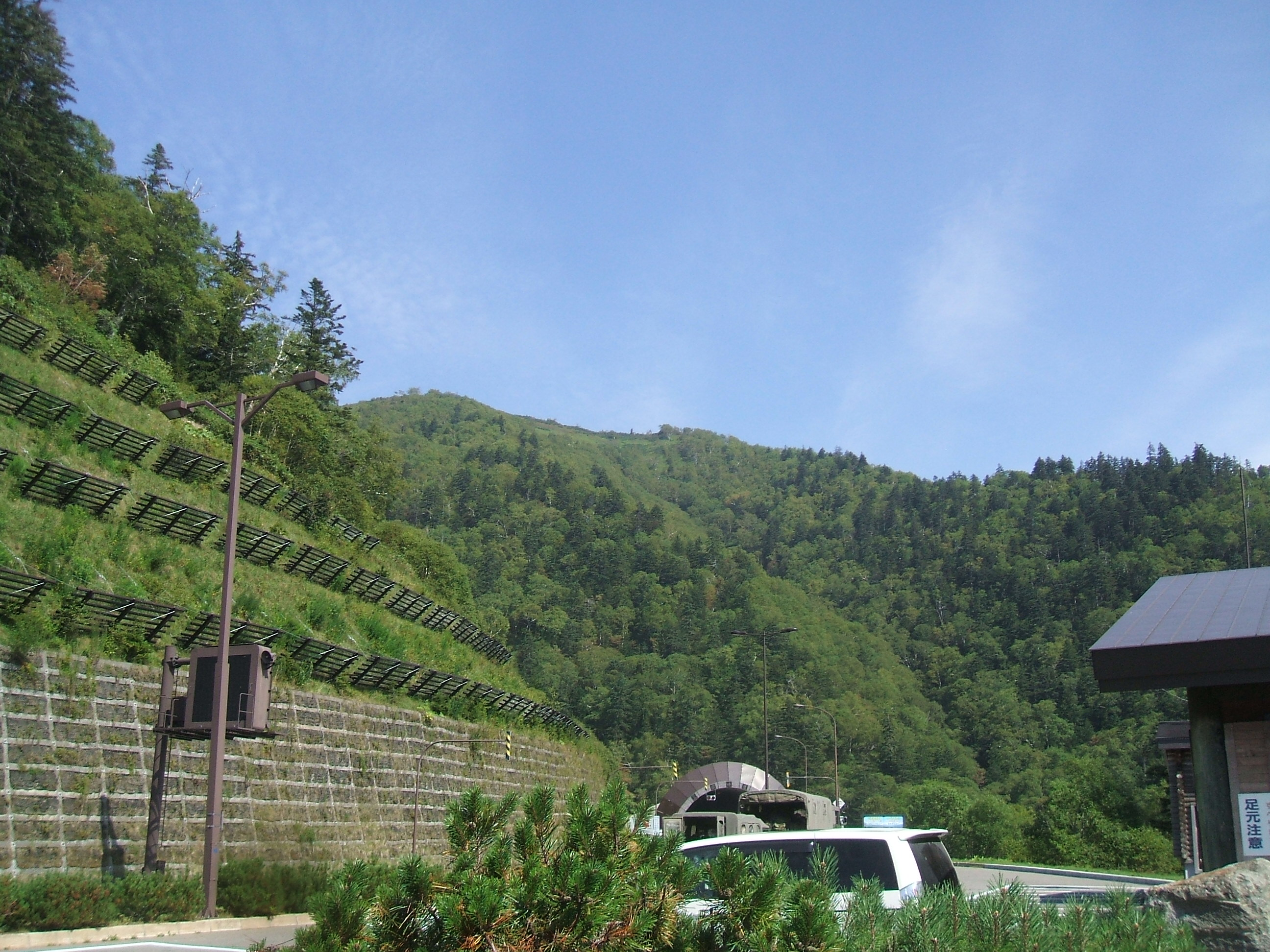 北海道三国峠、業務の関係により移動中休憩で立ち寄った峠の茶屋付近にて撮影、写真手前の車は投稿者本人の業務用車 奥には自衛隊が休憩しているのが確認出来る